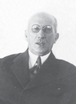 O 12º presidente do Brasil Artur Bernardes.